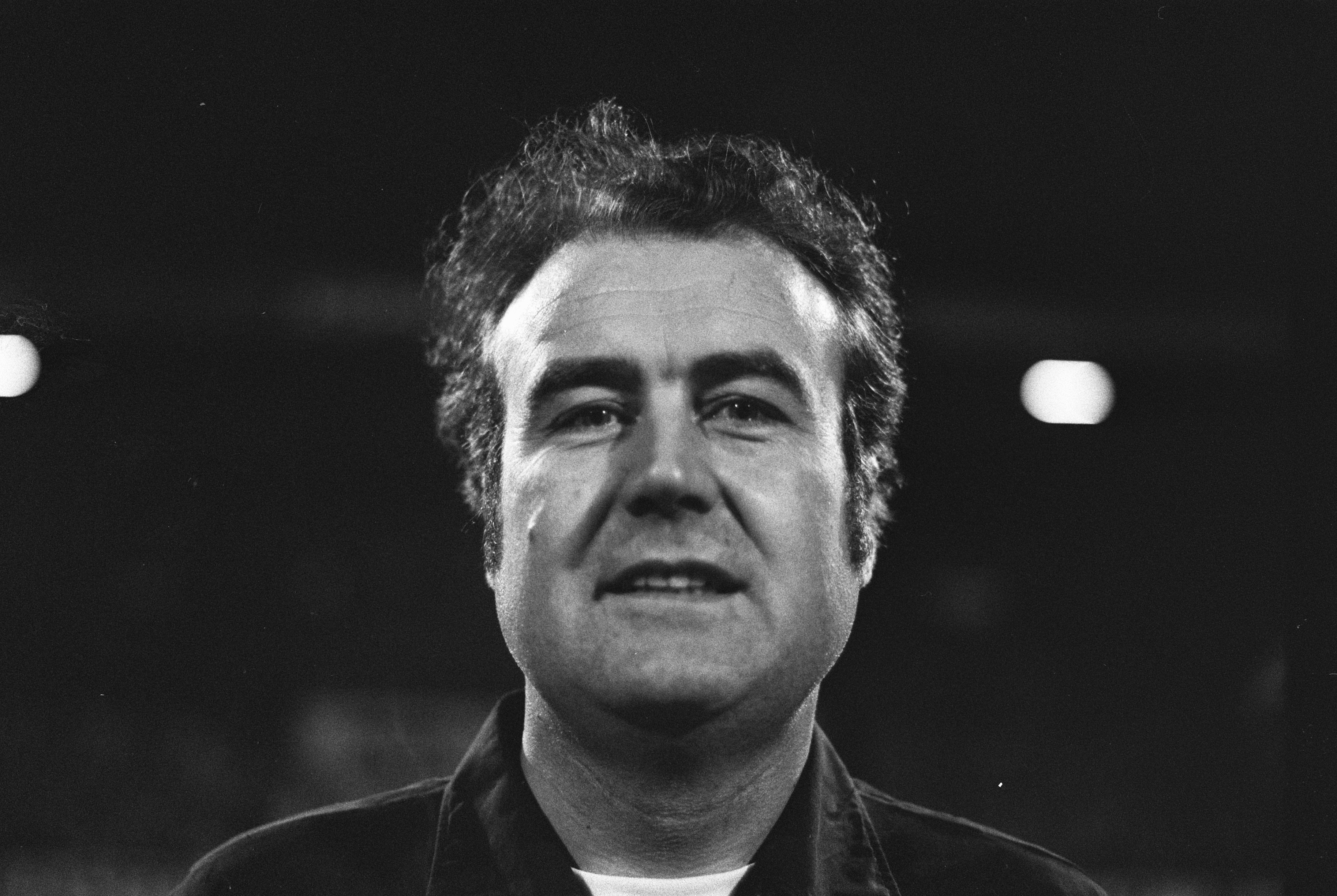 Collectie / Archief : Fotocollectie Anefo Reportage / Serie : [ onbekend ] Beschrijving : FC Antwerp tegen Ajax 2-1 UEFA Cup , Westduitse scheidsrechter Weyland (kop) Datum : 13 november 1974 Locatie : Antwerpen Trefwoorden : scheidsrechters, sport, voetbal Instellingsnaam : UEFA Cup Fotograaf : Peters, Hans / Anefo Auteursrechthebbende : Nationaal Archief Materiaalsoort : Negatief (zwart/wit) Nummer archiefinventaris : bekijk toegang 2.24.01.05 Bestanddeelnummer : 927-5812